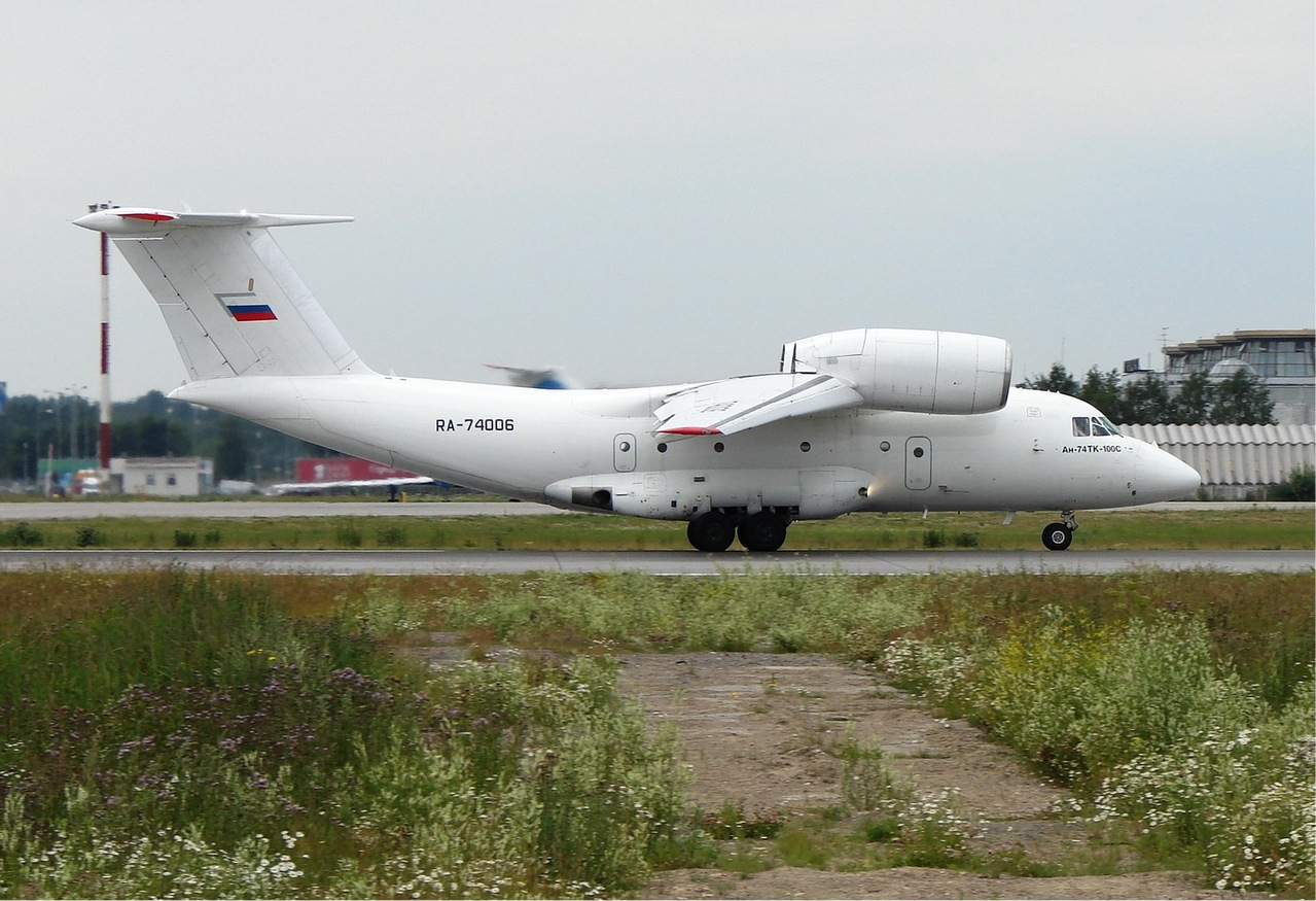 2nd Sverdlovsk Air Enterprise Antonov An-74TK-100C